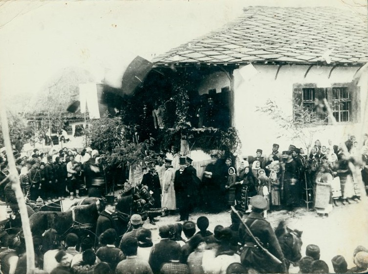 Снимка от откриване на къща-музей „Главна квартира на руската армия” в с. Пордим, Плевенско. Среща на румънския крал Карол с българския княз Фердинанд I пред къщата, в която е живял руския император Александър II.